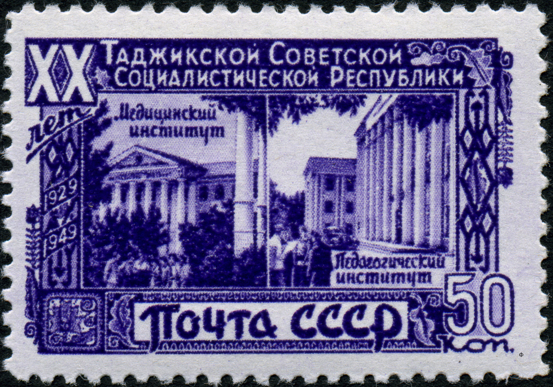 Почтовая марка СССР из серии «20-летие Таджикской Советской Социалистической Республики», выпущенная в декабре 1949 года. На ней изображены Медицинский институт имени Авиценны и педагогический институт, оба — в Душанбе. Художник — В. Андреев. Номер — 1477 (ЦФА). Тираж — 1 млн экз. Описание — по изданию «Каталог почтовых марок СССР 1918—1974», М., ЦФА, 1976.